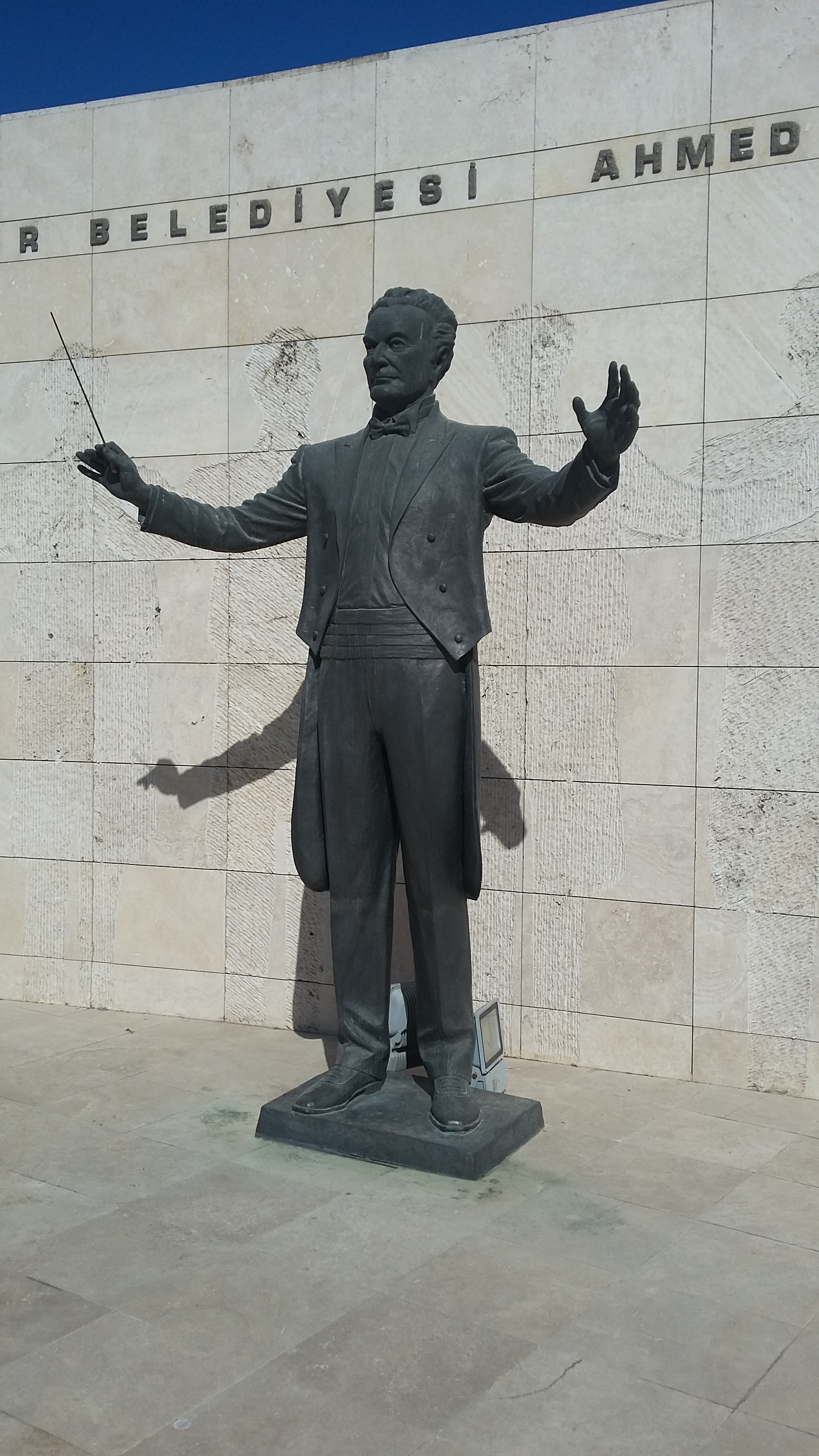 AASSM'de Ahmet Adnan Saygun heykeli